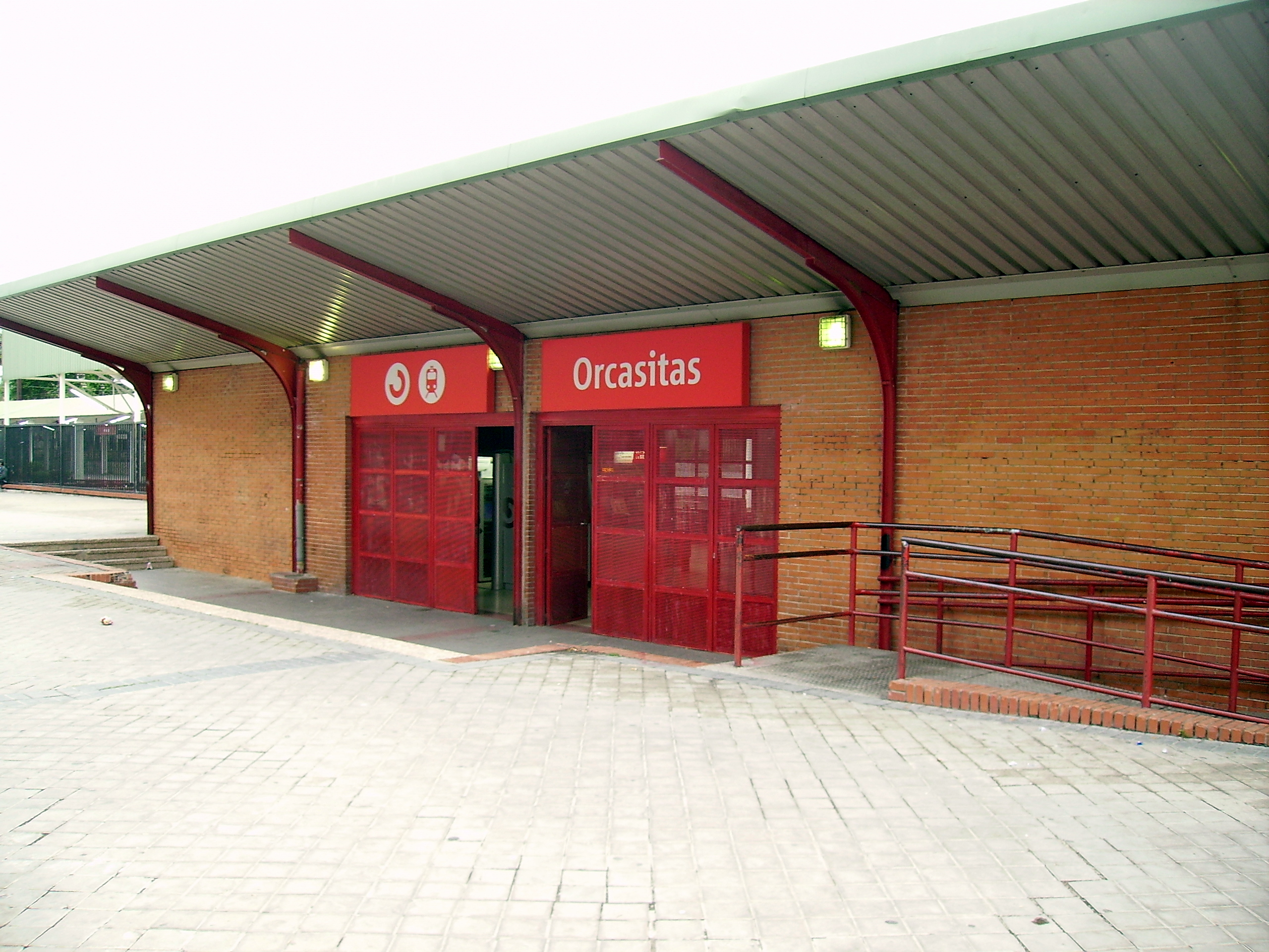 Estación de Orcasitas (Madrid).